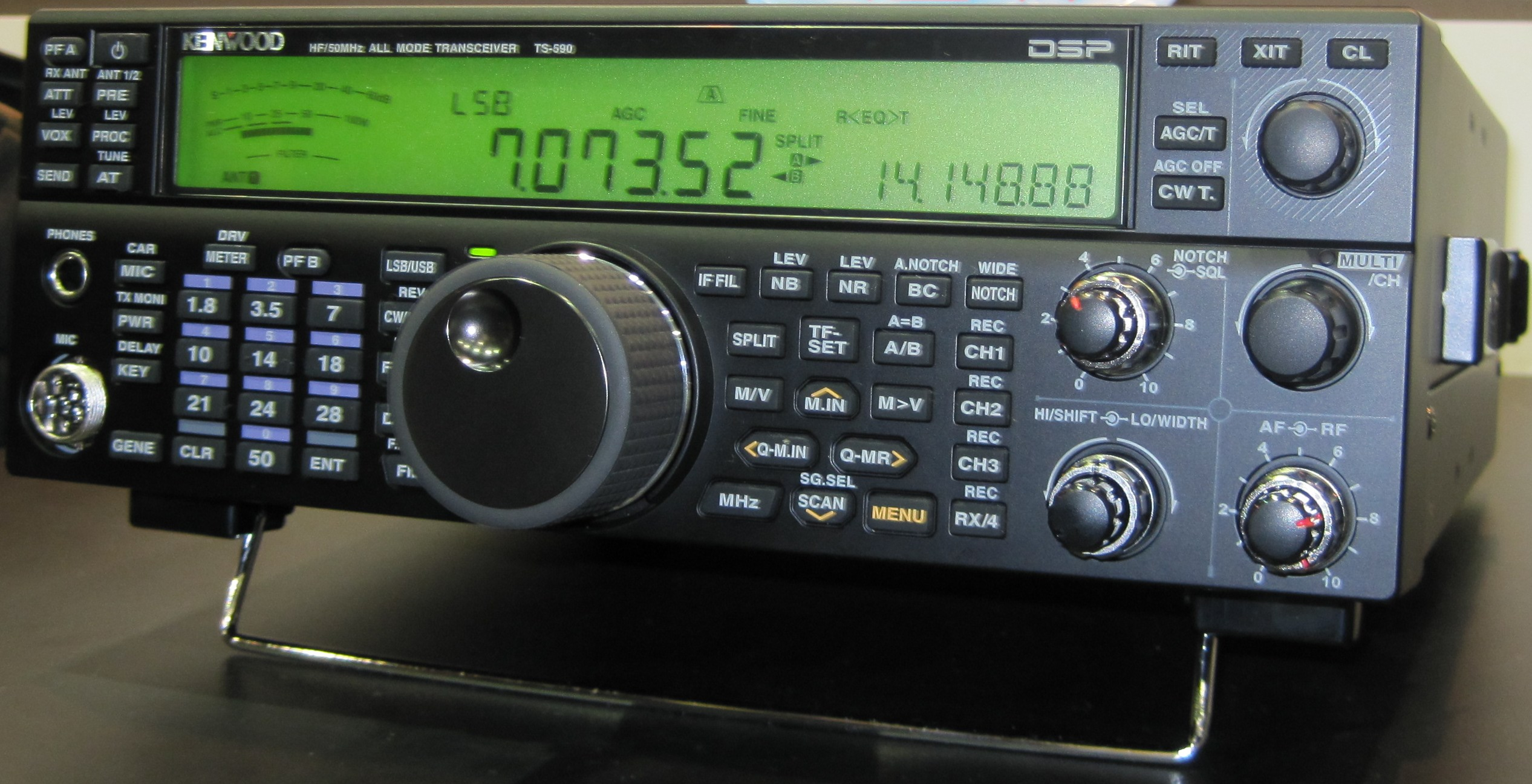 Kenwood TS-590S HF and 6m transceiver